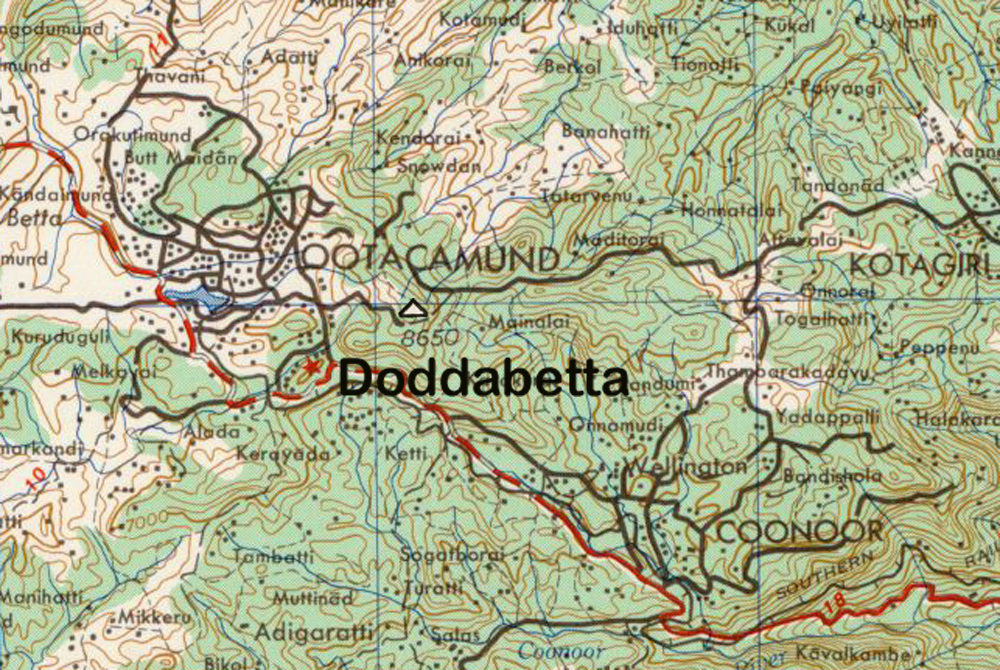 Topo Map, Doddabetta Peak, Tamil Nadu, India.